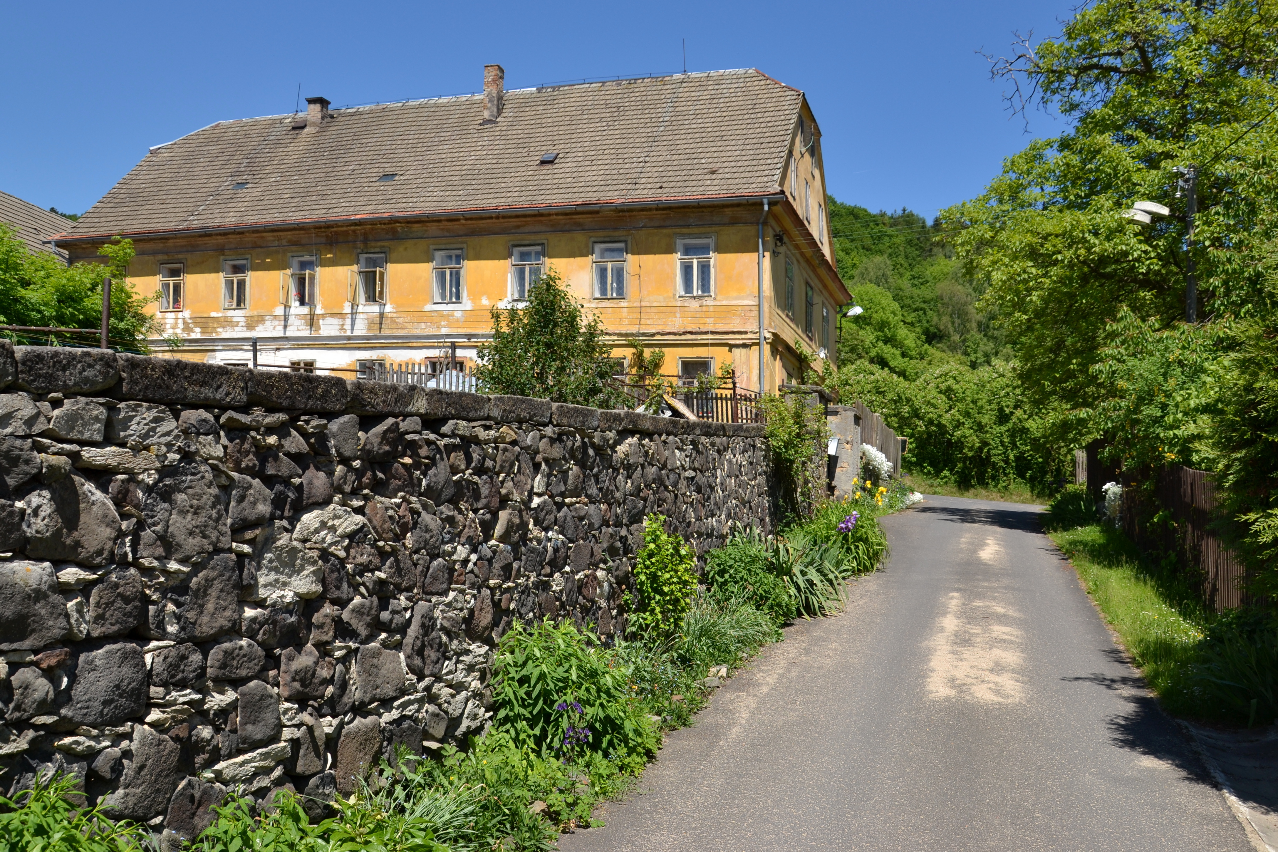 Dolní Vysoké – Dům čp. 21